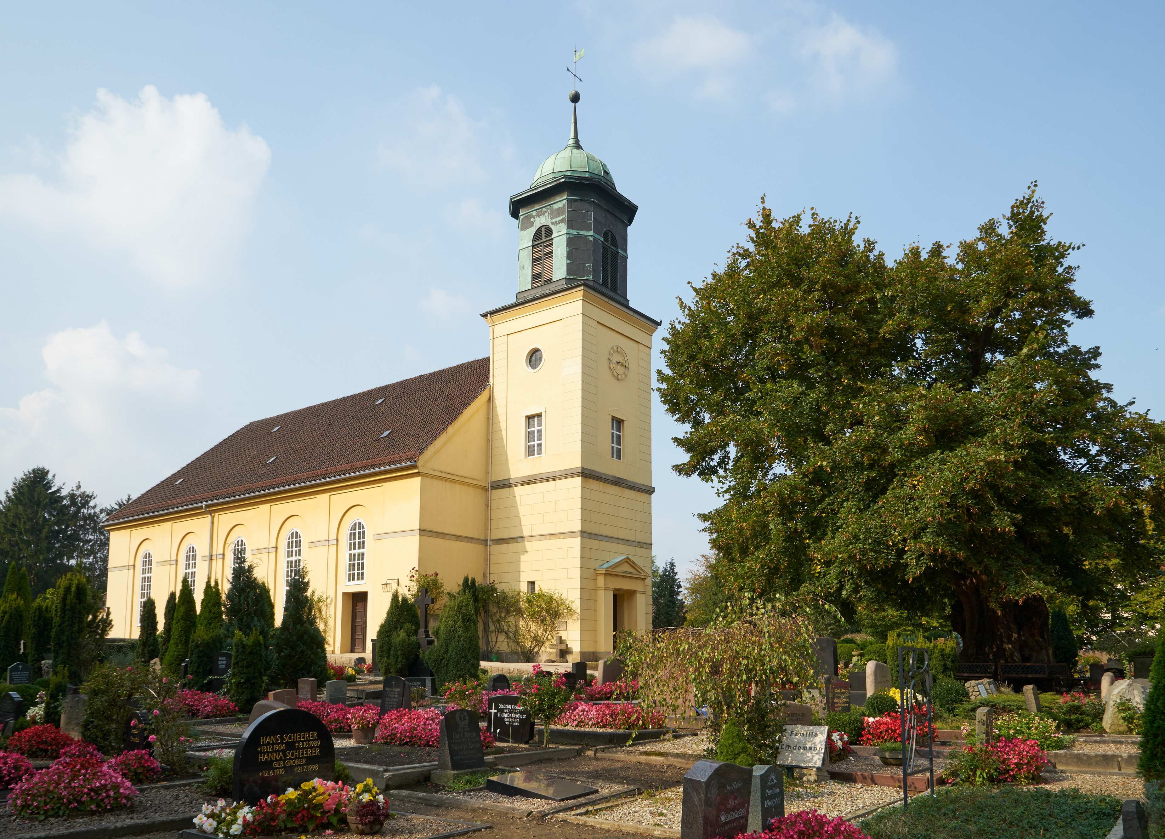 Horner Kirche in Bremen, Horner Heerstraße 30. Die etwa 900 Jahre alte Linde auf dem Kirchhof.Das abgebildete Objekt ist ein geschütztes Kulturdenkmal in der Freien Hansestadt Bremen, mit der Nr. 0623 beim Landesamt für Denkmalpflege registriert.